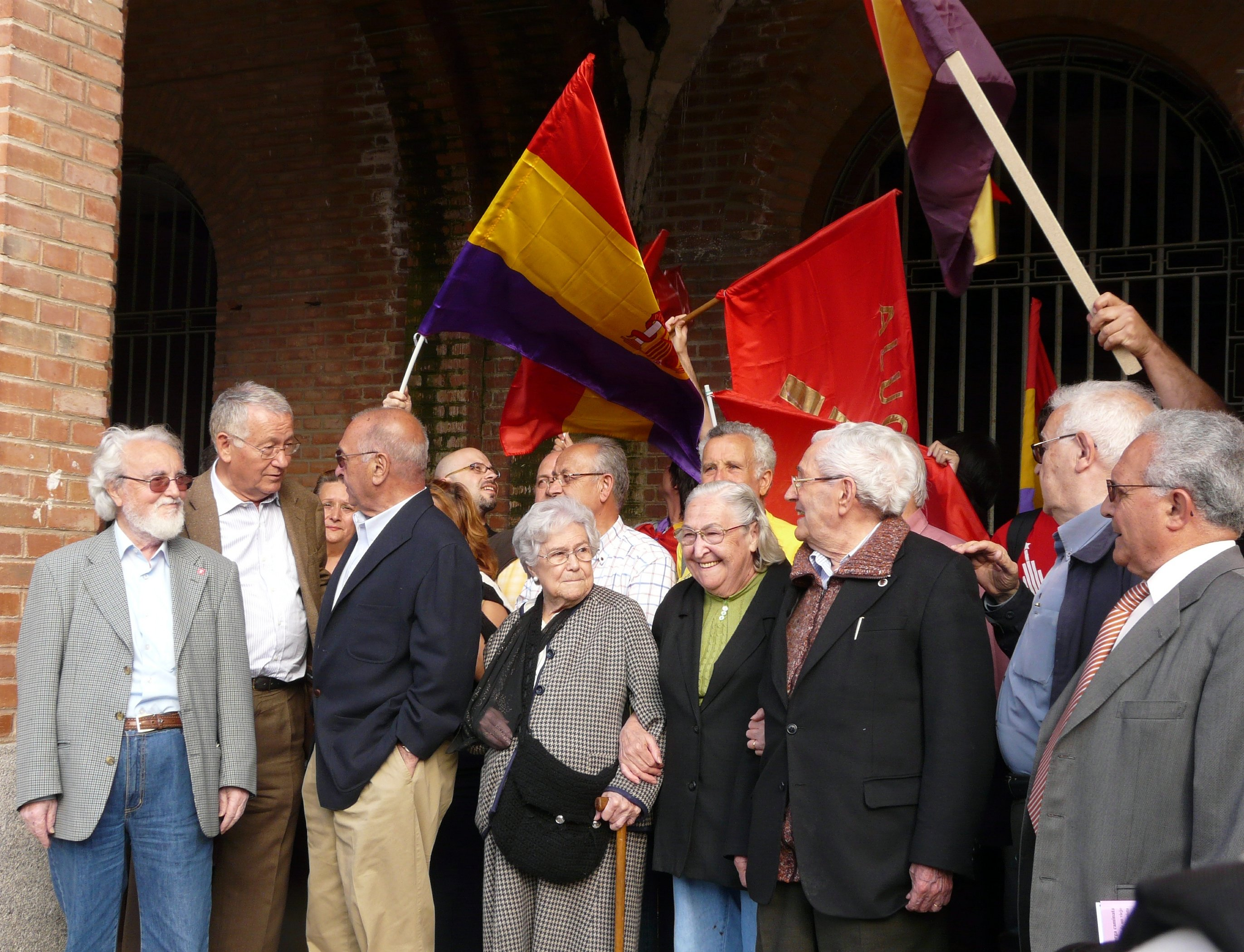 Julián Ariza, Nicolás Redondo, la viuda de Simón Sánchez Montero, y Marcelino Camacho en el acto en el que se descubrió una placa en la cárcel de Carabanchel en recuerdo a los presos políticos. Todos los datos aquí.